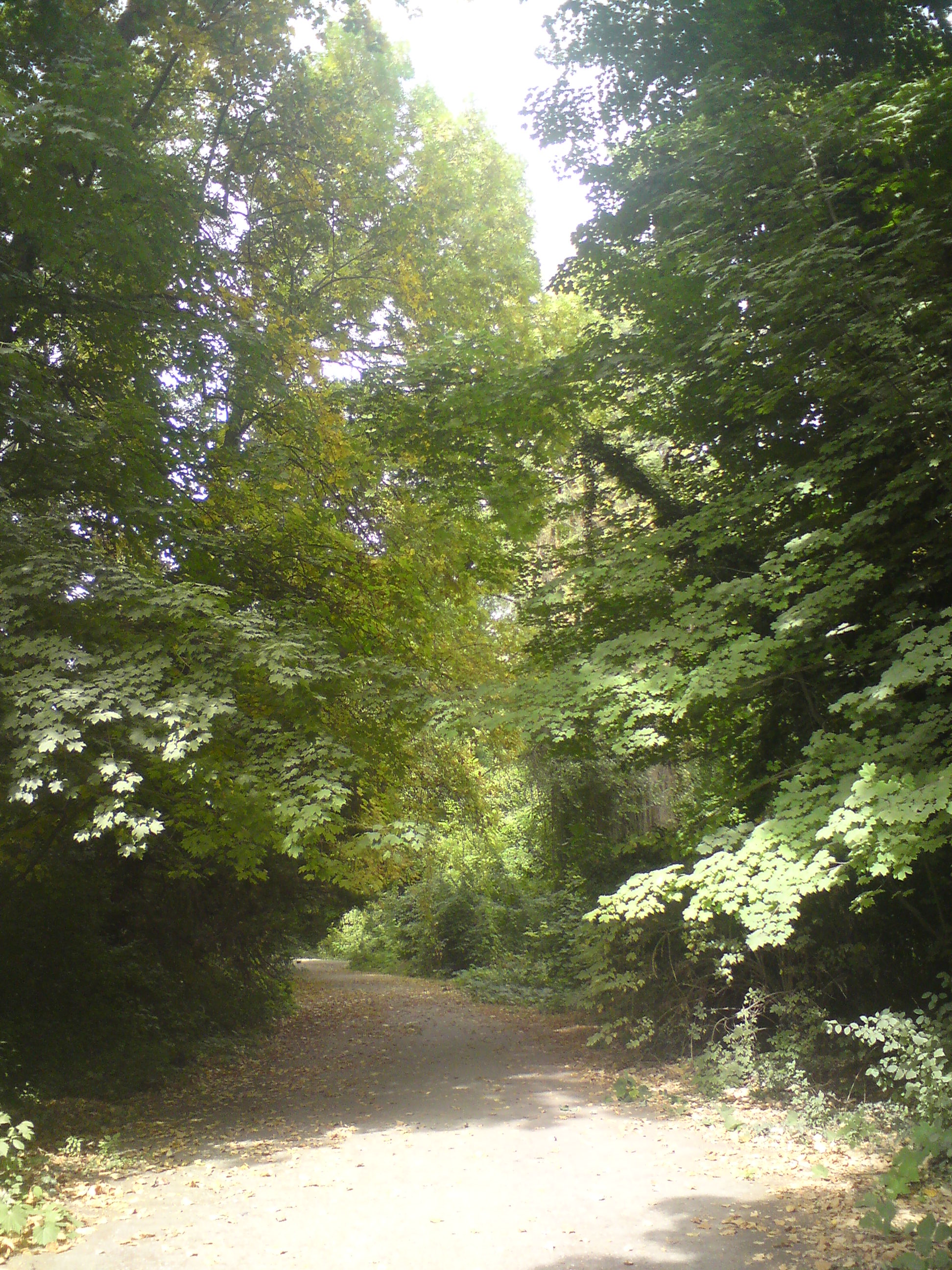 Ботанический сад Ташкента, восточноазиатская коллекция. Рододендроны